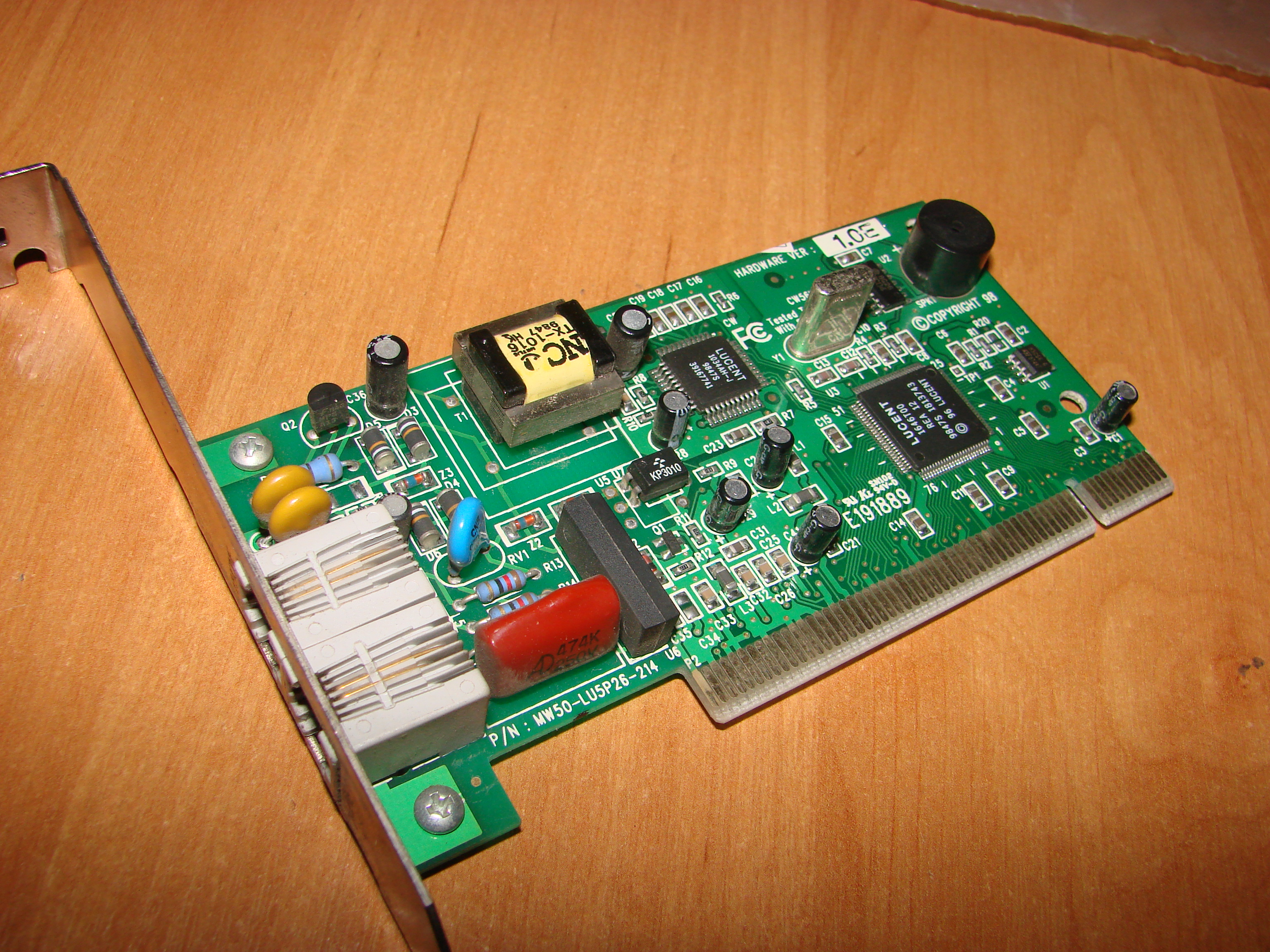 Ещё один модем.